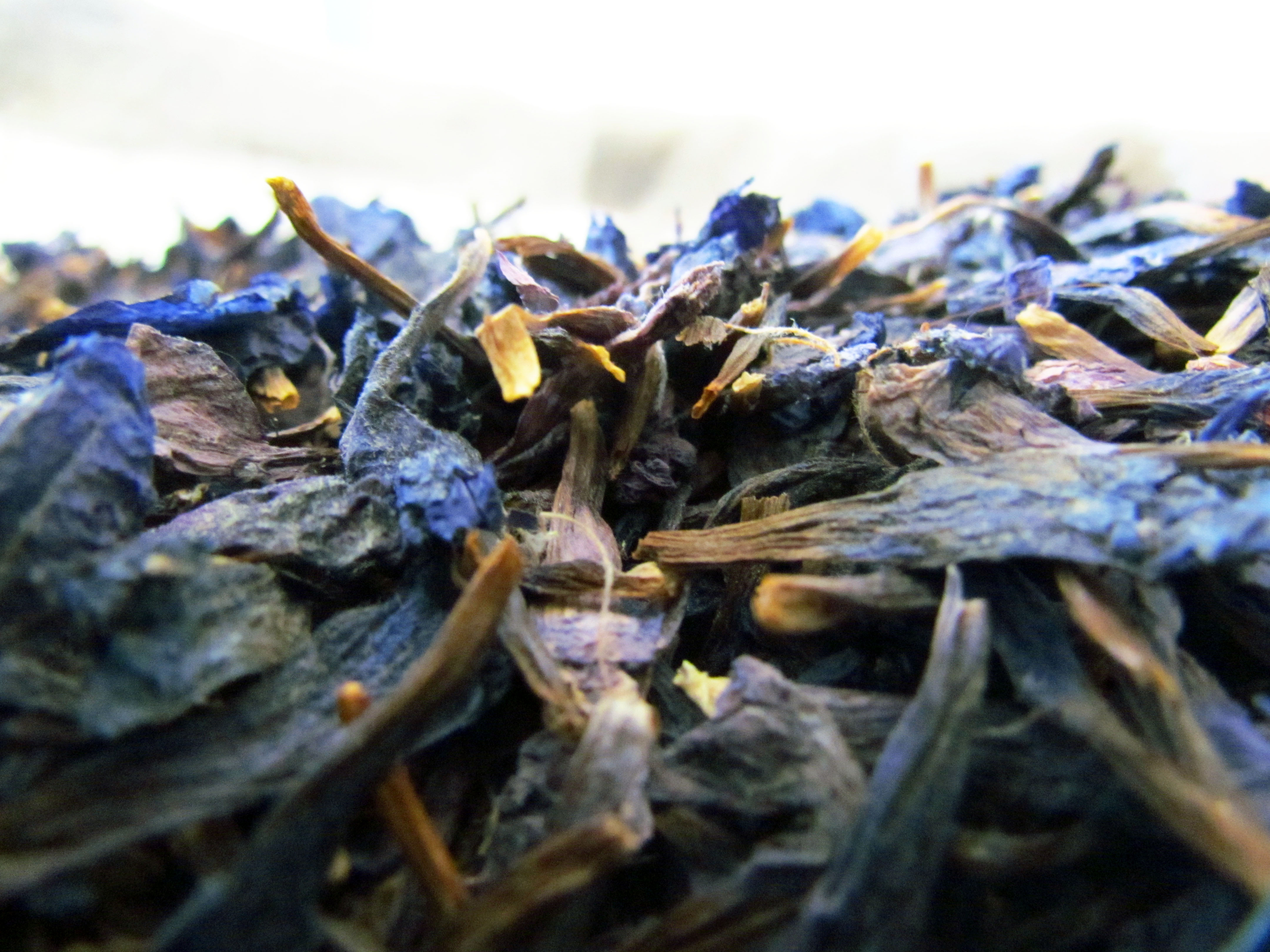 گل گاوزبان خشک شده